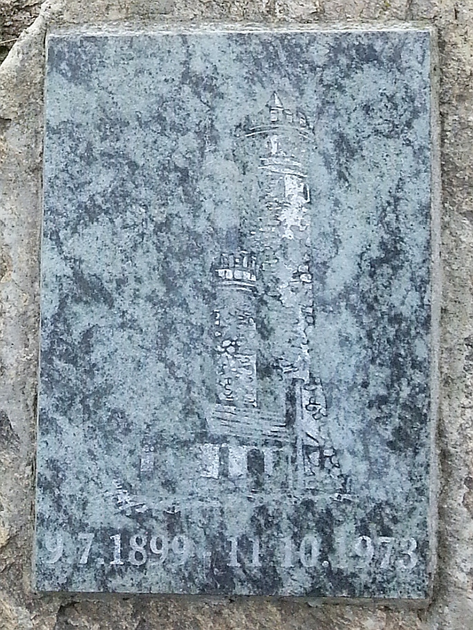 Rozhledna na Králickém Sněžníku - pamětní deska s podobou rozhledny a daty jejího otevření a zániku.